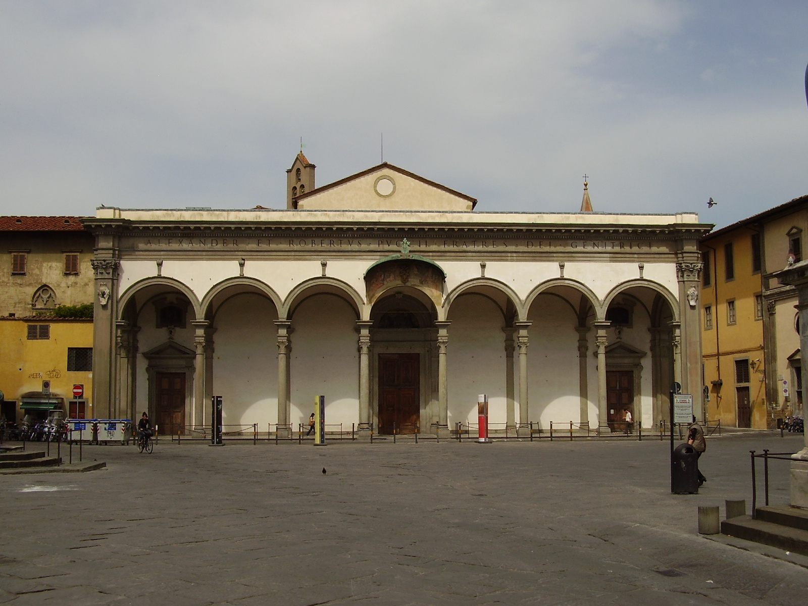 Santissima Annunziata, church facade in Florence, Italy